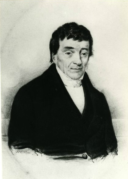 Joseph Gockinga (1778-1851), rechter en Tweede Kamerlid